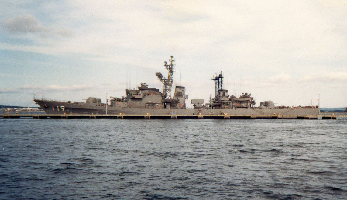 大湊港に停泊中の護衛艦あおくも